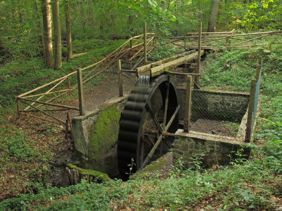 Cöthener Fliesstal, Flora-Fauna-Habitat, Wasserrad im Wald. Querformat, Webauflösung